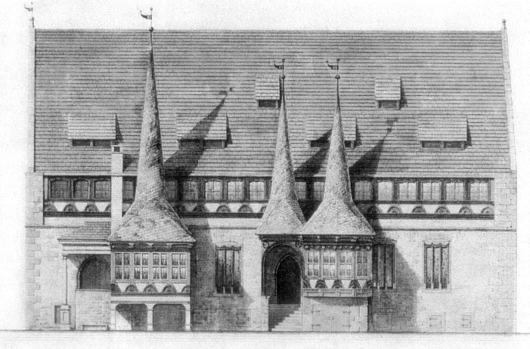 Zeichnung des Alten Rathauses Einbeck im 19.Jahrhundert mit der ältesten Darstellung der mittelalterlichen Aussehens